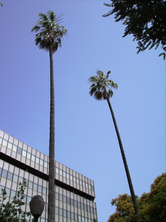 Image:Washingtonia_16_juny_Imatges_016.jpg